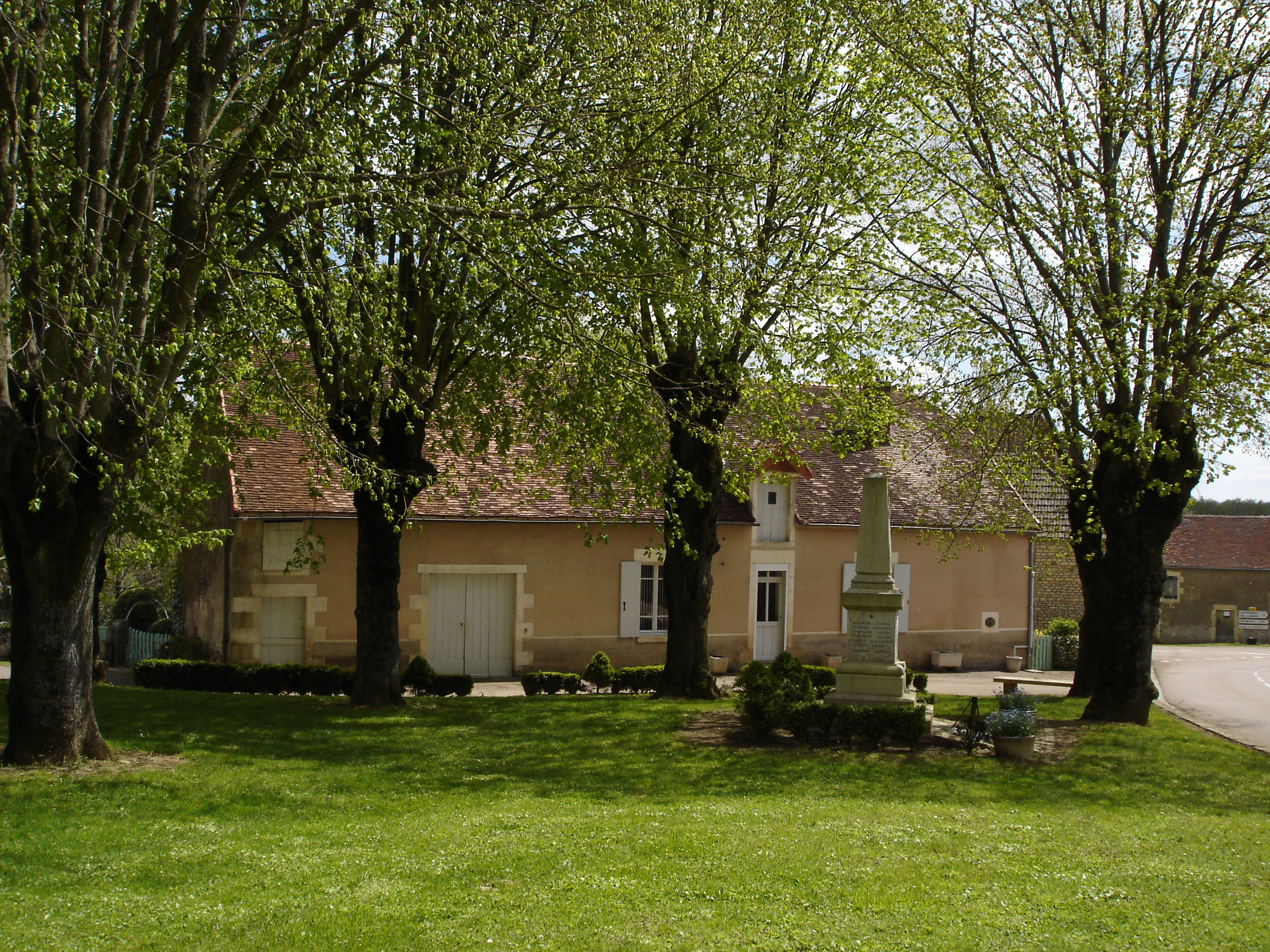 Place de l'église sainte colombe des bois nièvre France